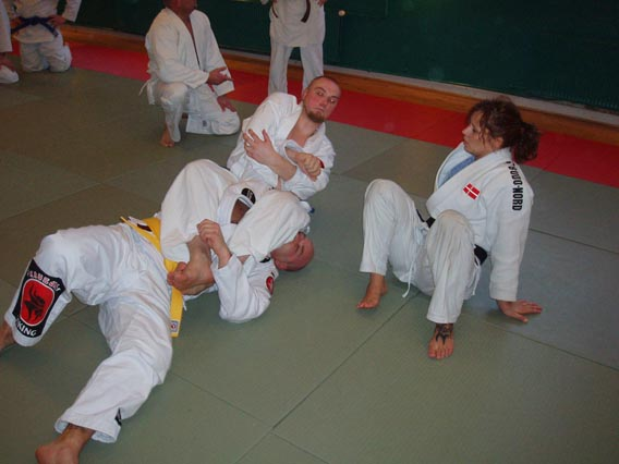 Ju-Jitsu udøvere træner